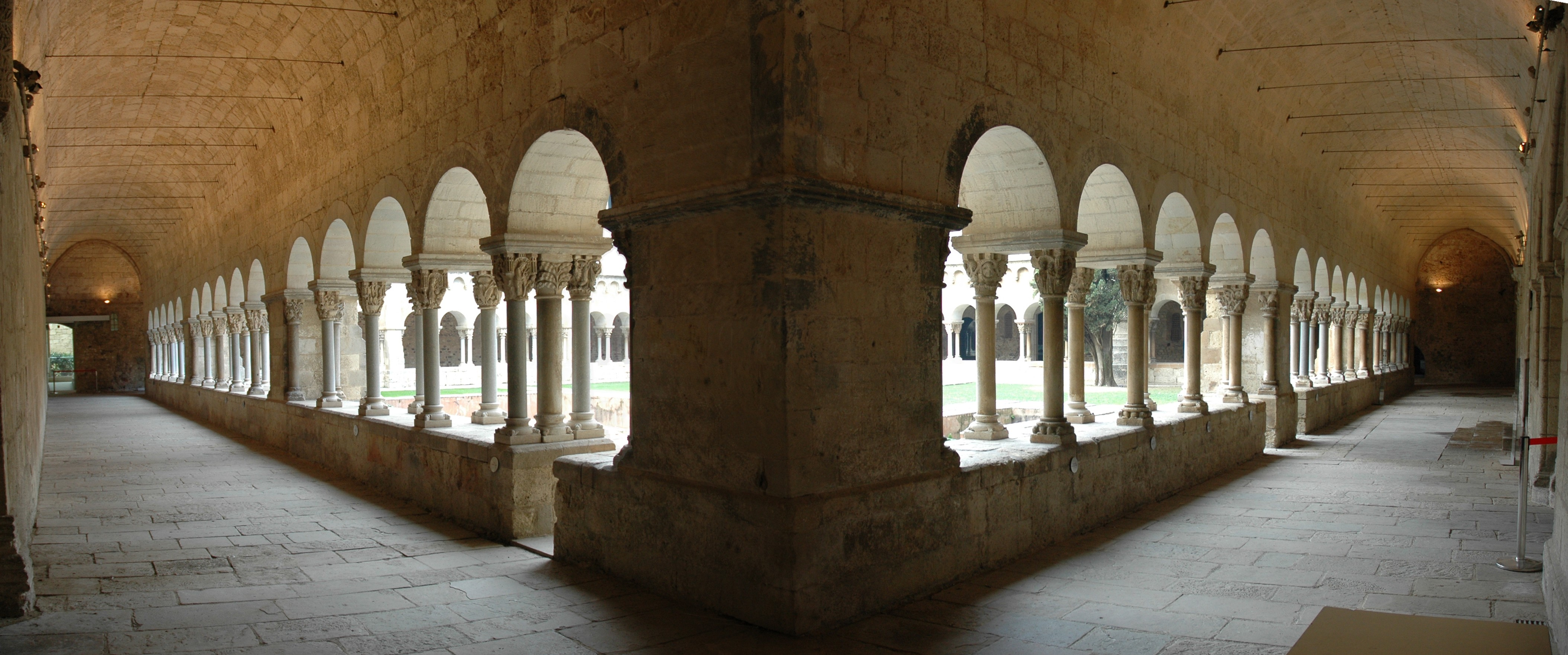 Monestir de Sant Cugat - Claustre angle sud-est